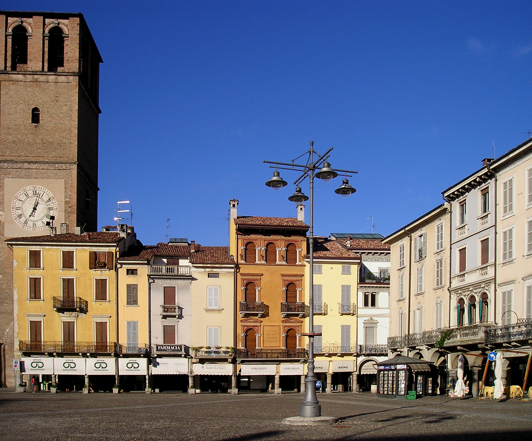 Scorcio di piazza della Vittoria a Lodi.